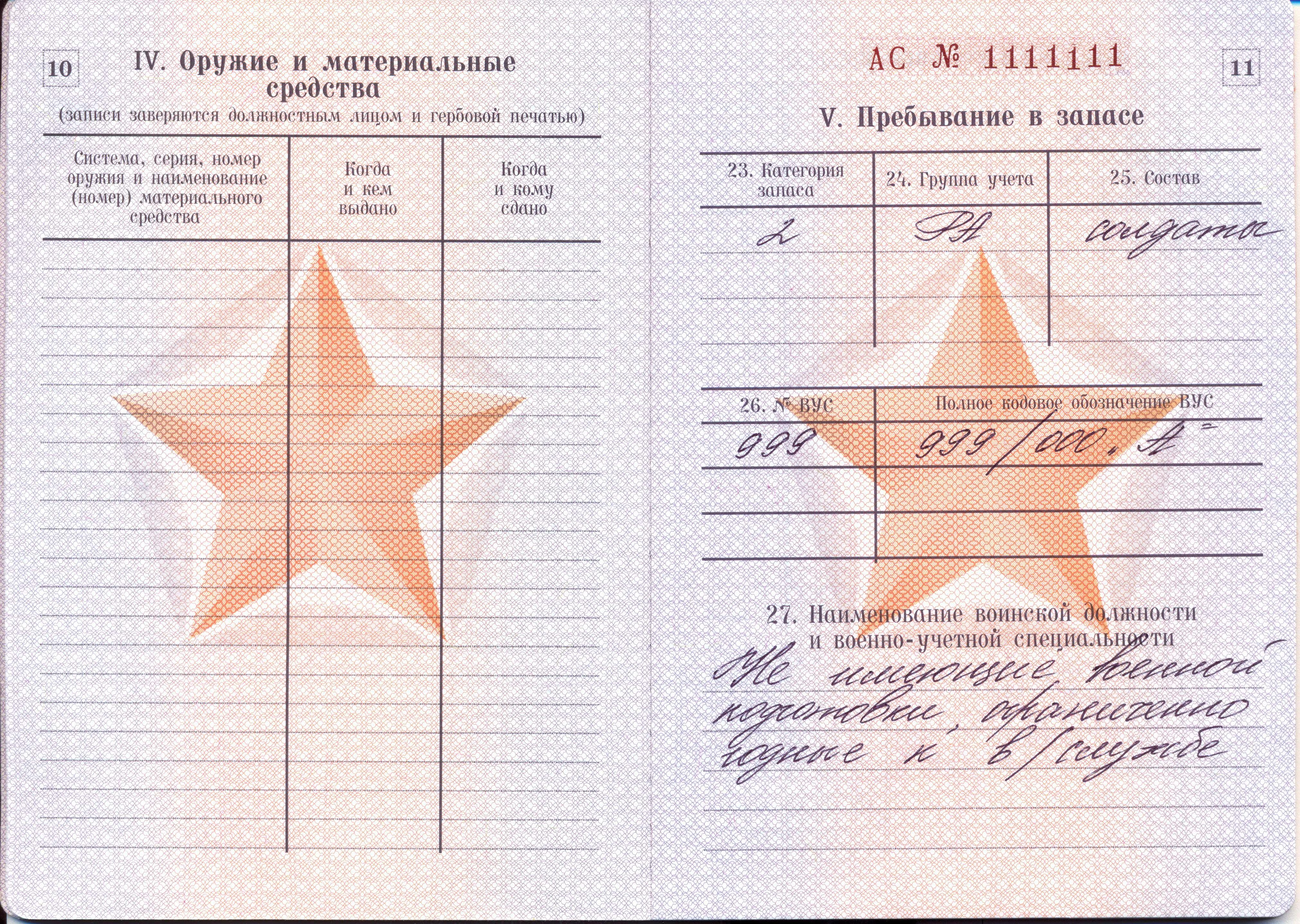 Военный билет (солдата, матроса, сержанта, старшины, прапорщика, мичмана), выданный в 2012 году в России. Отсканированное изображение подвергалось компьютерной обработке для сокрытия номера документа.